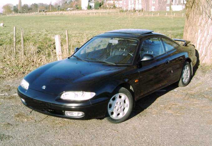 Mazda MX-6